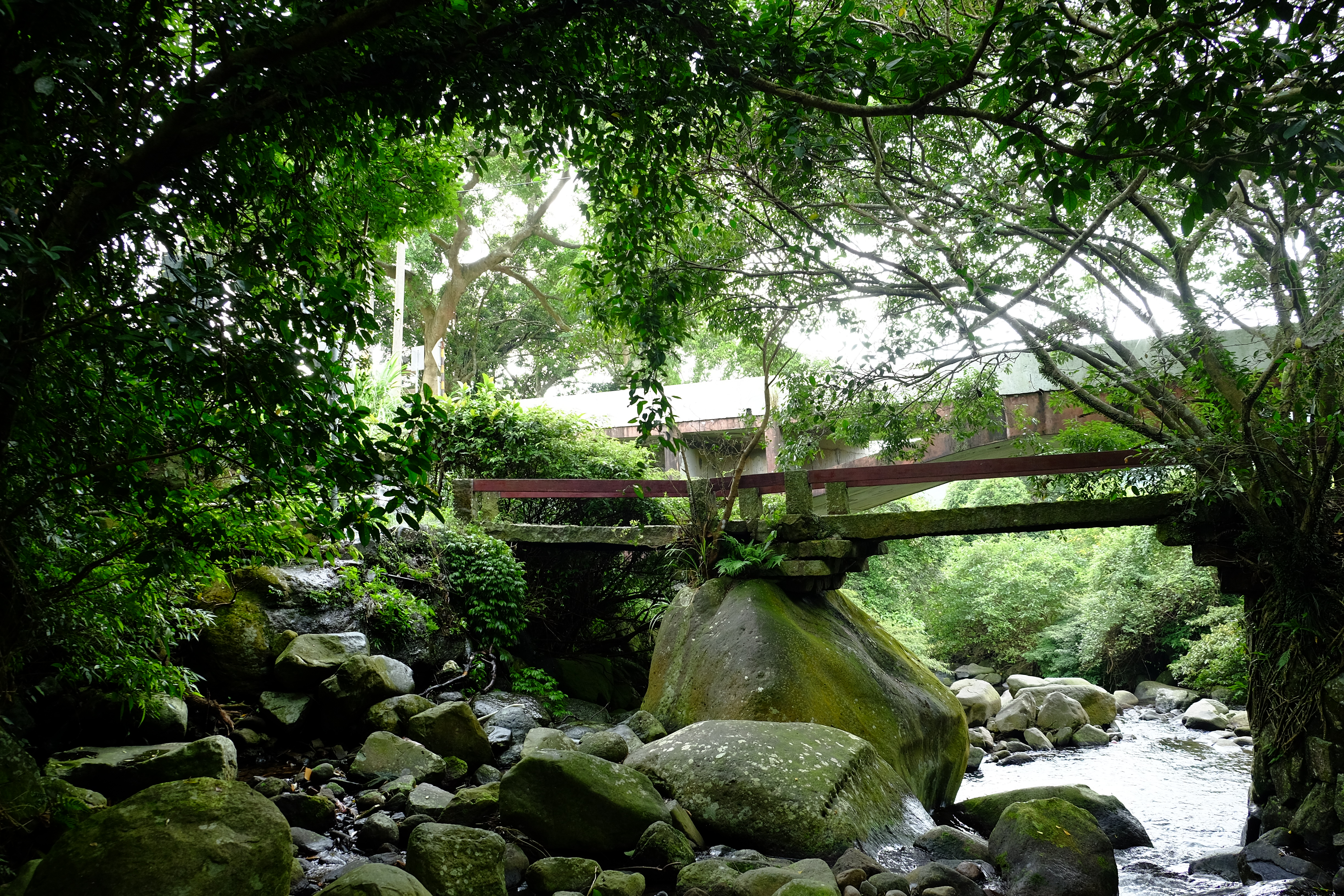 三芝三板橋